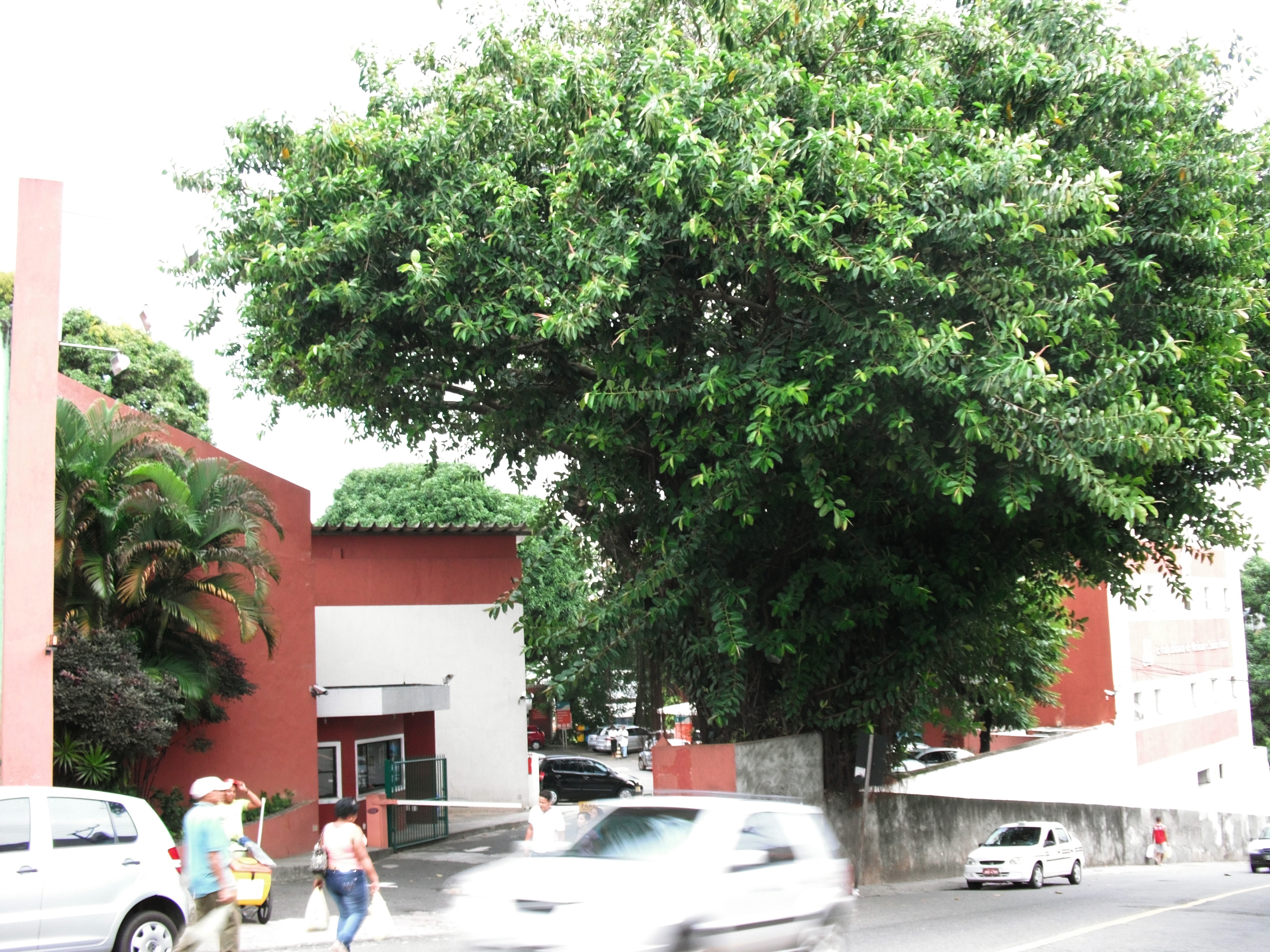 Entrada principal do campus de Nazaré da Escola Bahiana de Medicina e Saúde Pública. Salvador - BA - Brasil.